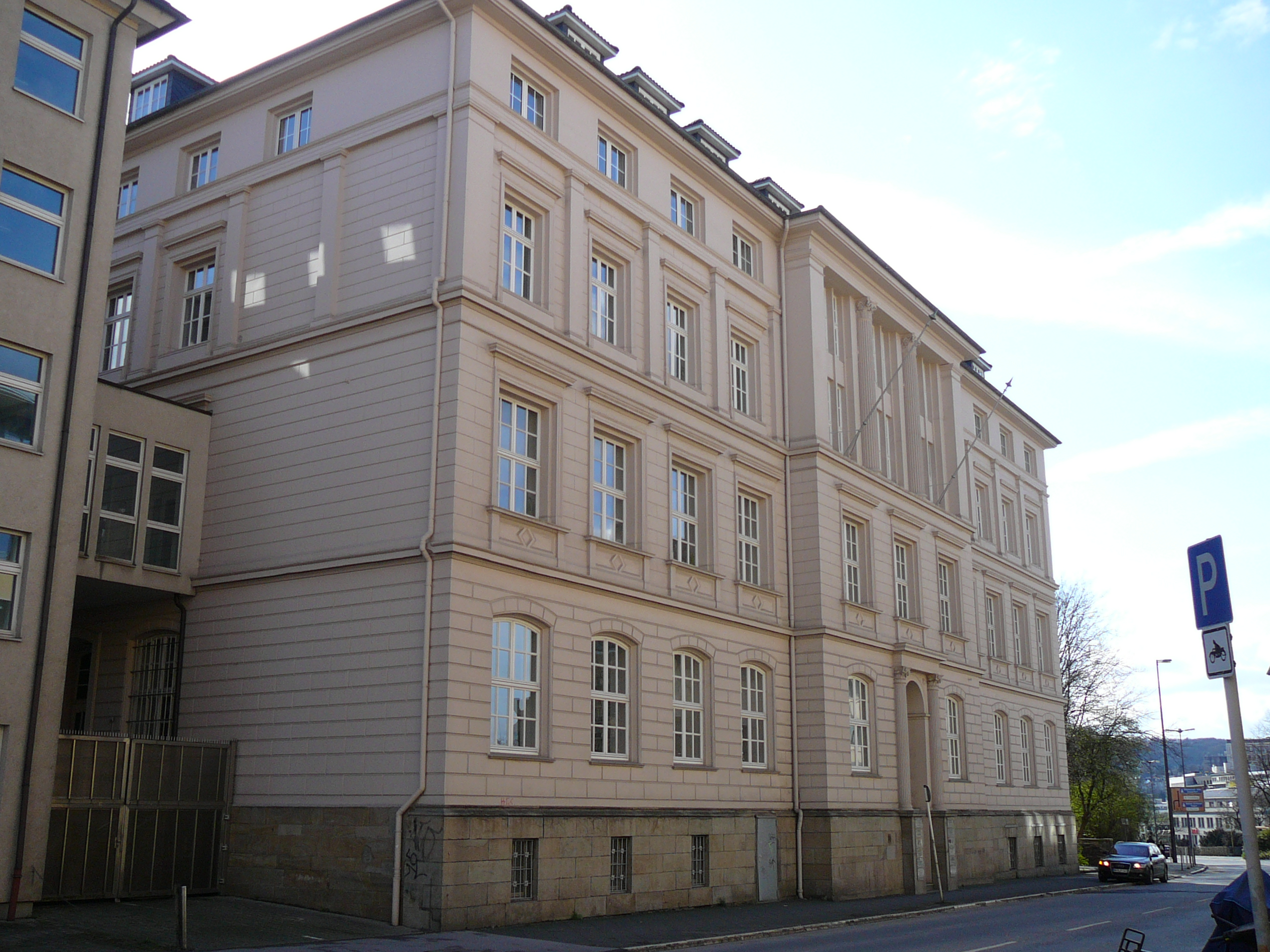 Döppersberg, Dürer-Haus, Wuppertal